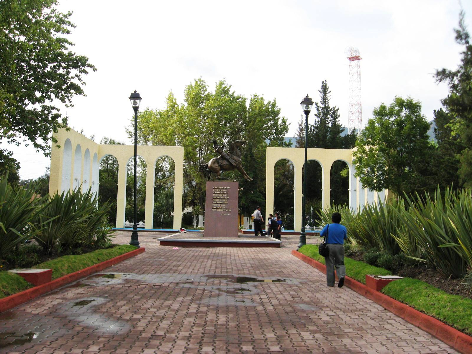 Parque del Charro, Antiguo aspecto del Parque de la Familia en Pachuca, Hidalgo